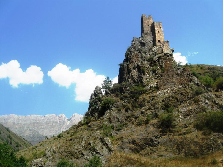 Вовнушки на фоне Скалистого хребта